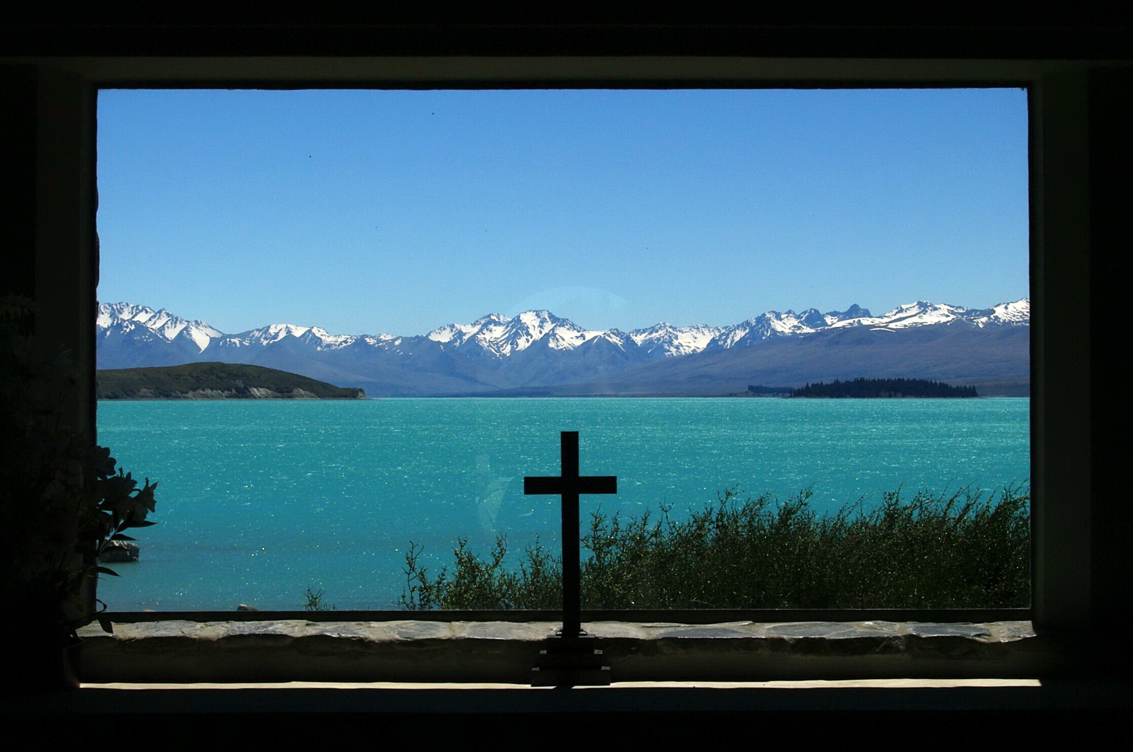 Blick aus der Kirche zum Guten Hirten, Lake Tekapo